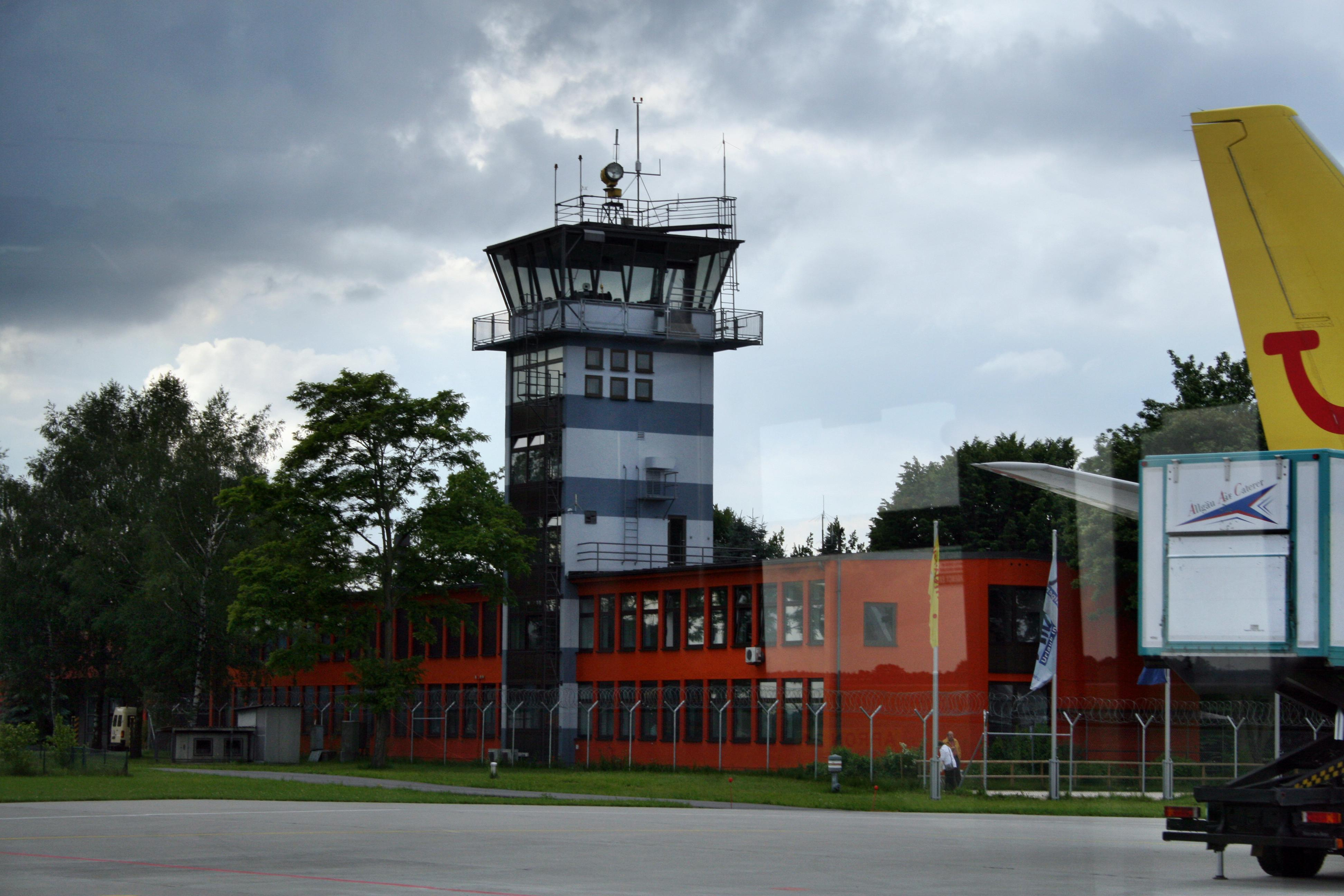 Der Tower des Allgäu Airports